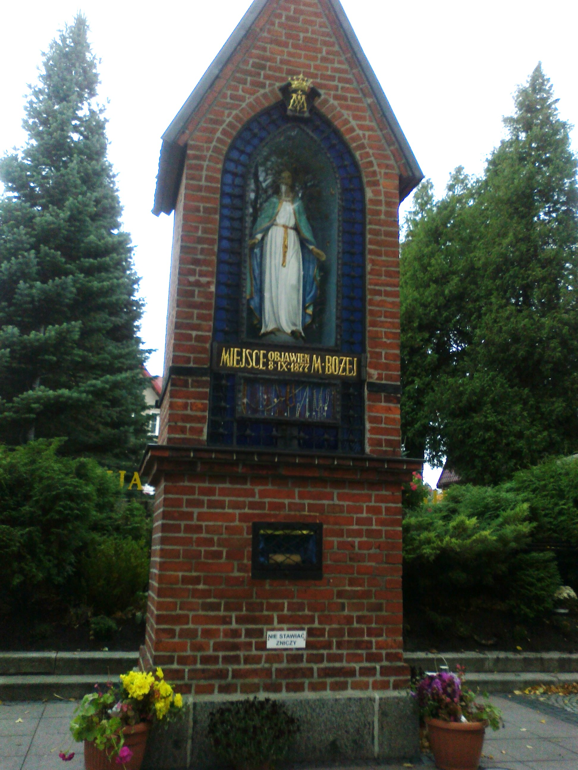 Kapliczka objawień Matki Bożej w Gietrzwałdzie